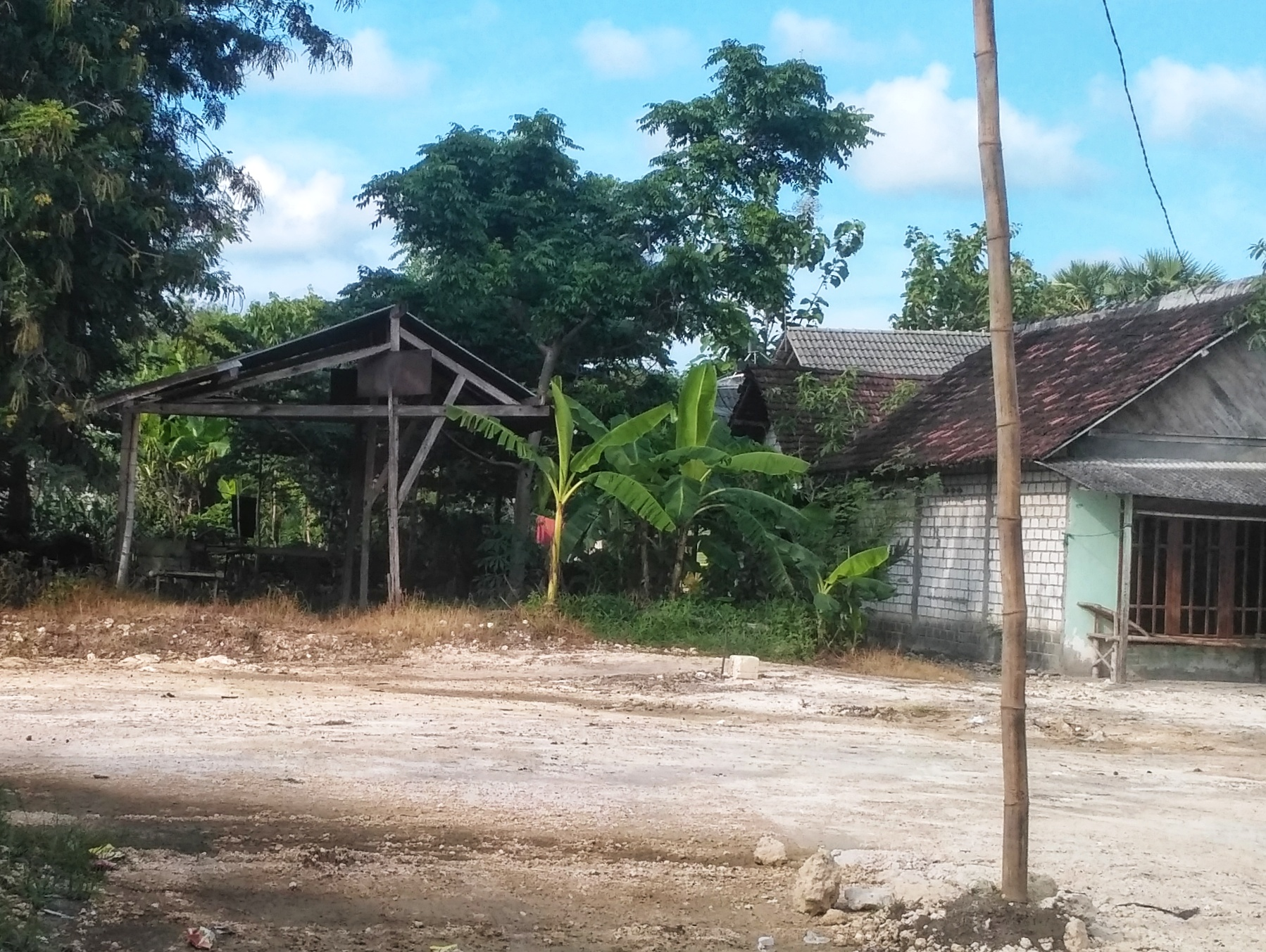 Halte Kepet setelah dipindahkan oleh penyewa lahan milik PT KAI.